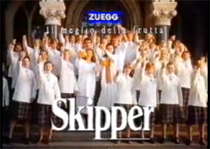 Lo spot degli anni '80